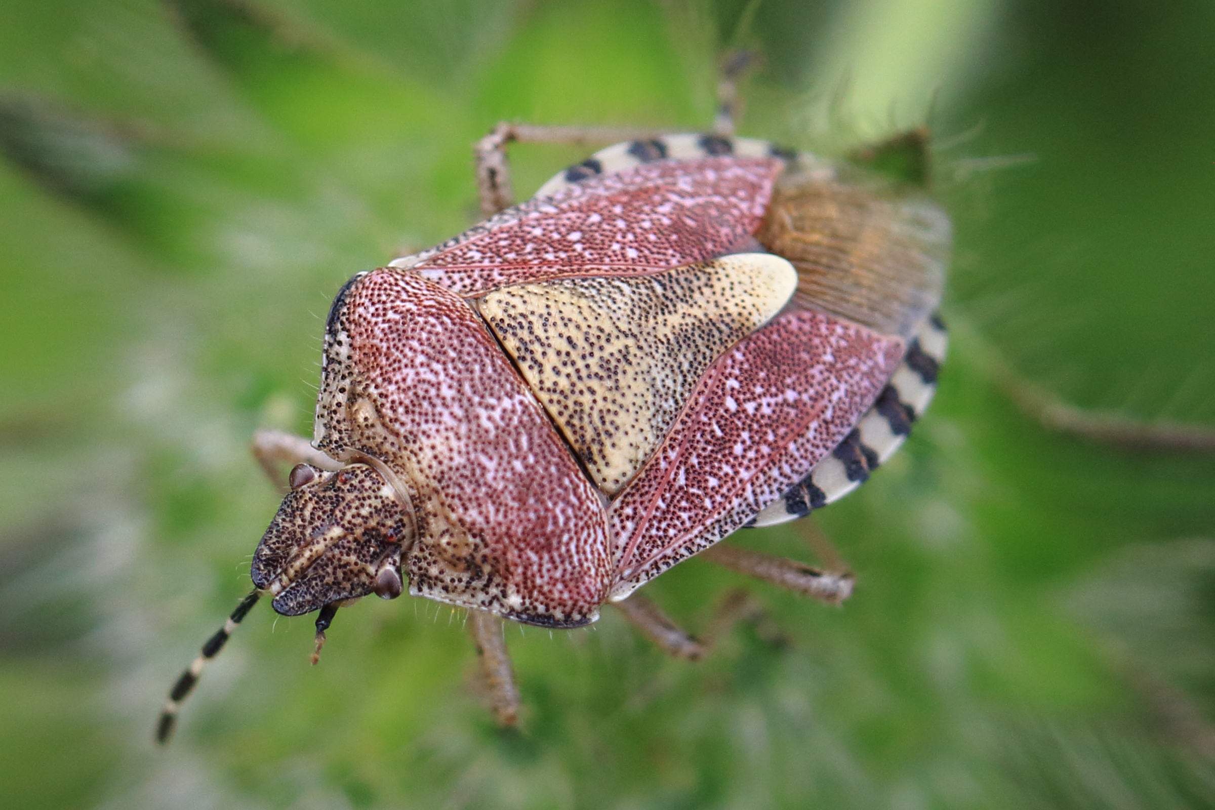 Beerenwanze Dolycoris baccarum Das abgebildete Insect wurde am 8. August 2015 von Meloe auf WP:RBIO/B bestimmt The insect shown here has been identified from Meloe on WP:RBIO/B 2015, August 8th